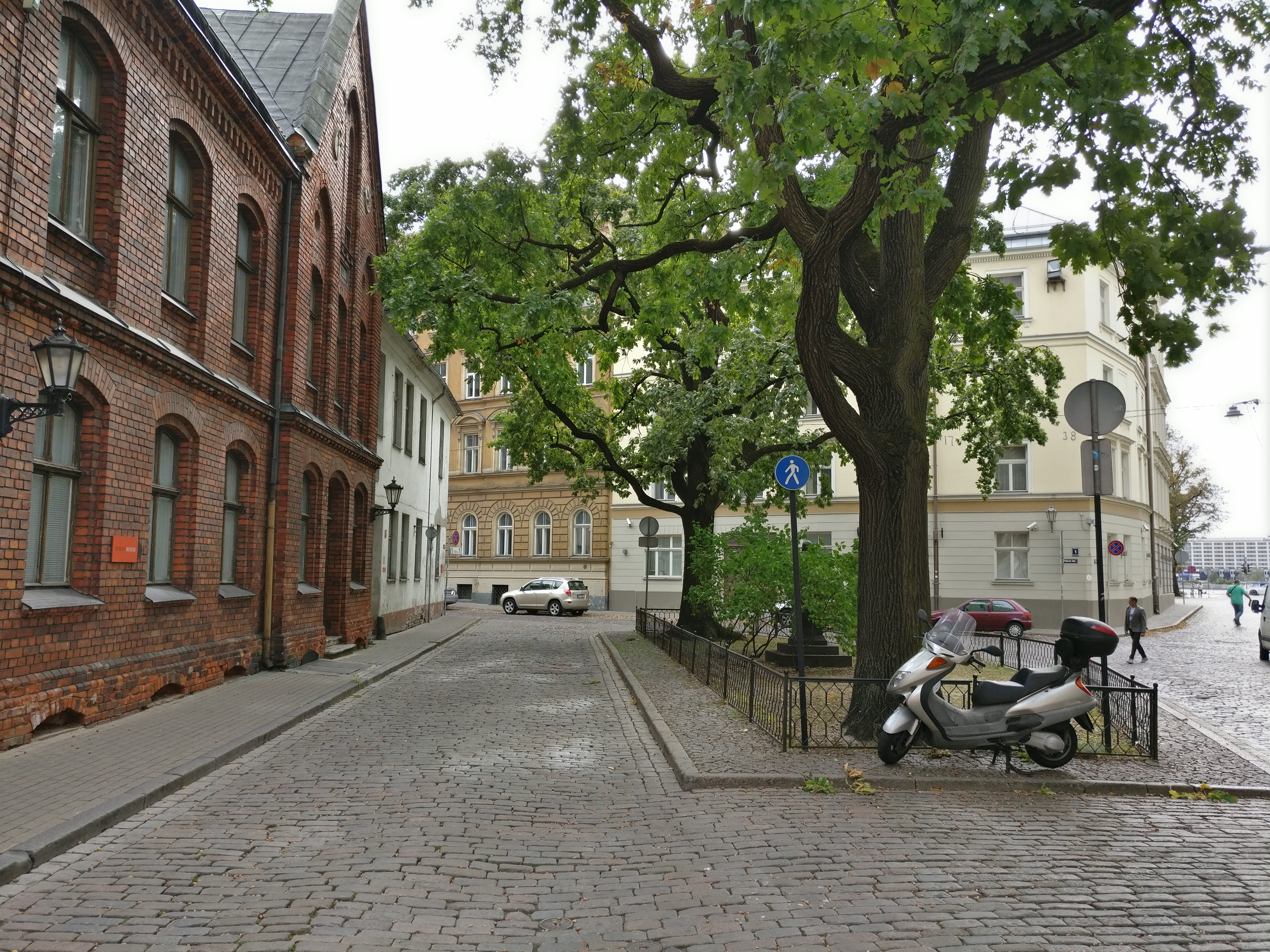 Herdera laukums, Centra rajons, Herdera laukums